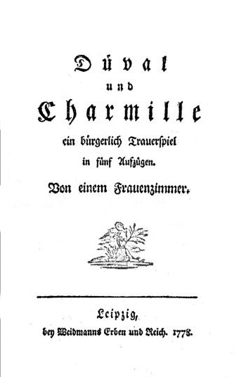 Cover der Erstausgabe des Stückes Düval und Charmille von Christiane Karoline Schlegel.